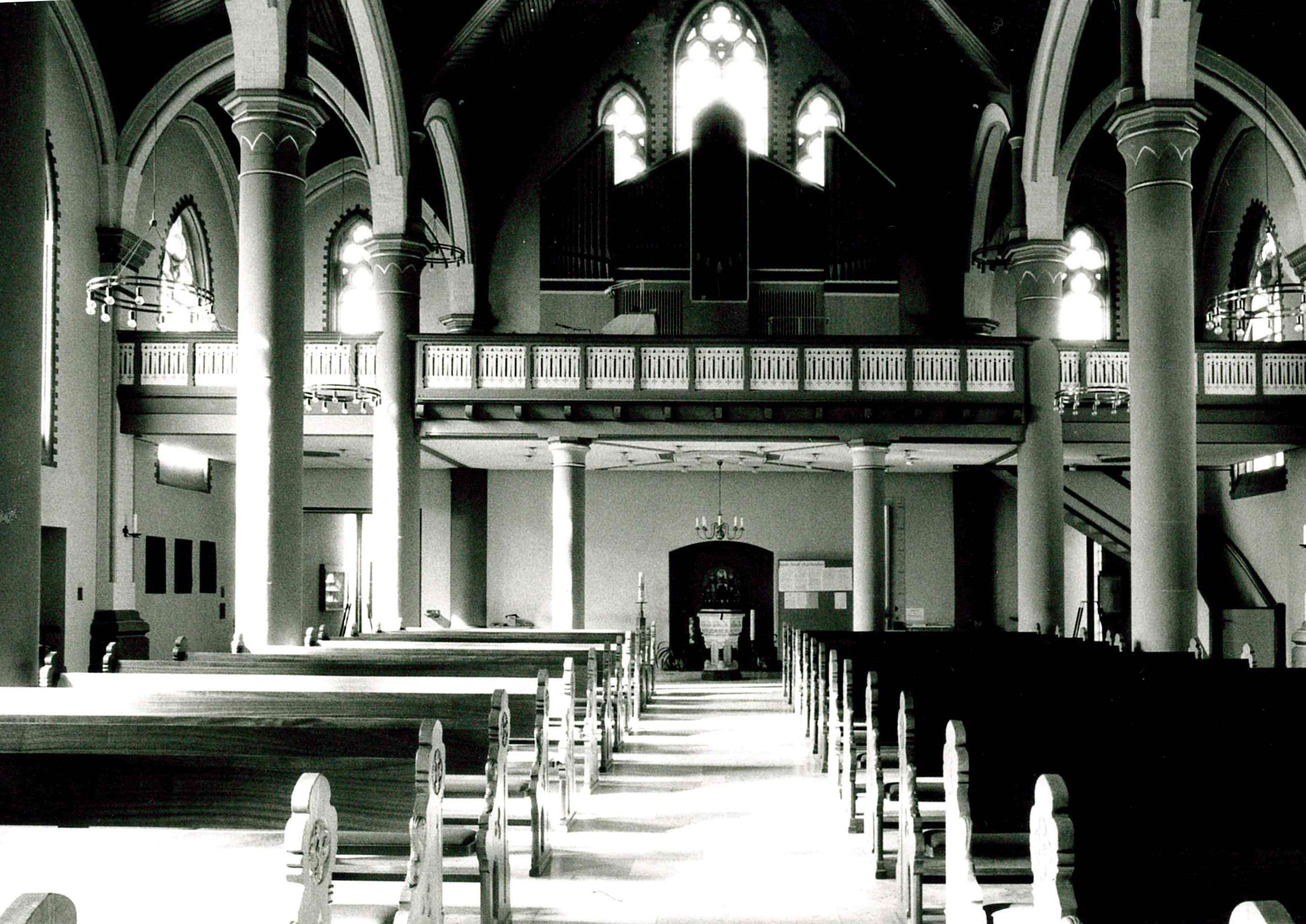 Schwarz-Weiß Bild der alten Orgel-Bühne von St. Josef